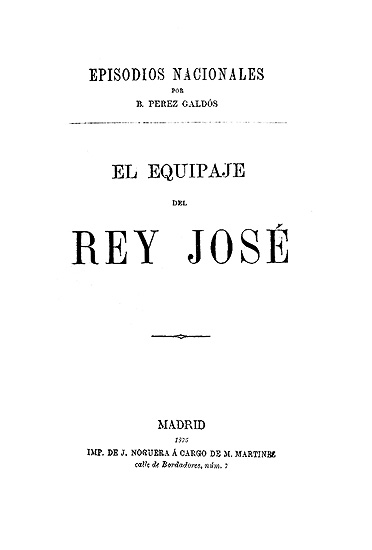 Cubierta de "El equipaje del rey José" (edición de 1875), episodio nacional de Benito Pérez Galdós